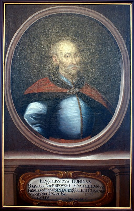 Беларуская (тарашкевіца): Рафал Сарбеўскі